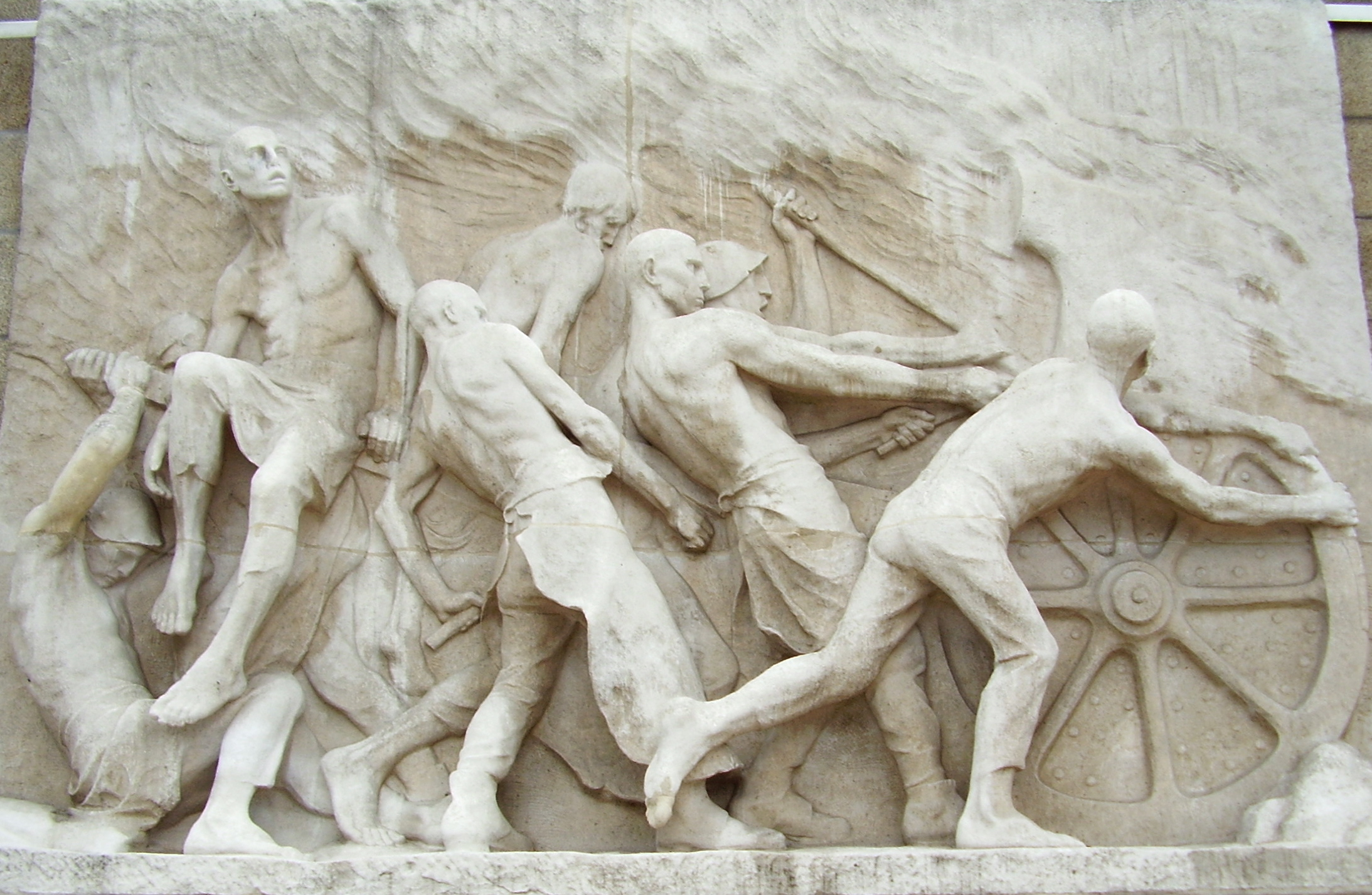 Description: Monument au Travail, Bruxelles - L'Industrie, Constantin Meunier Author: User:Ben2 Date of creation: 20 juin 2006 Source: Photo personnelle